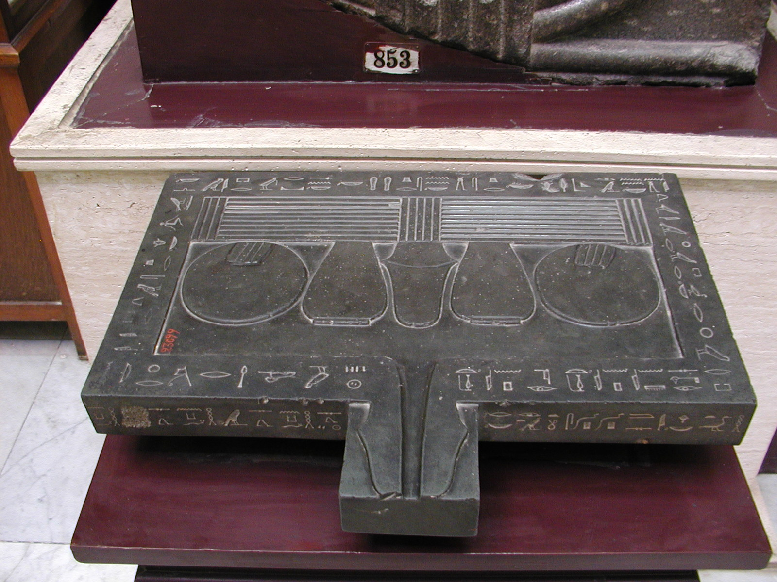 Antiquité égyptienne, Table d'offrandes, Musée égyptien du Caire, (Égypte).